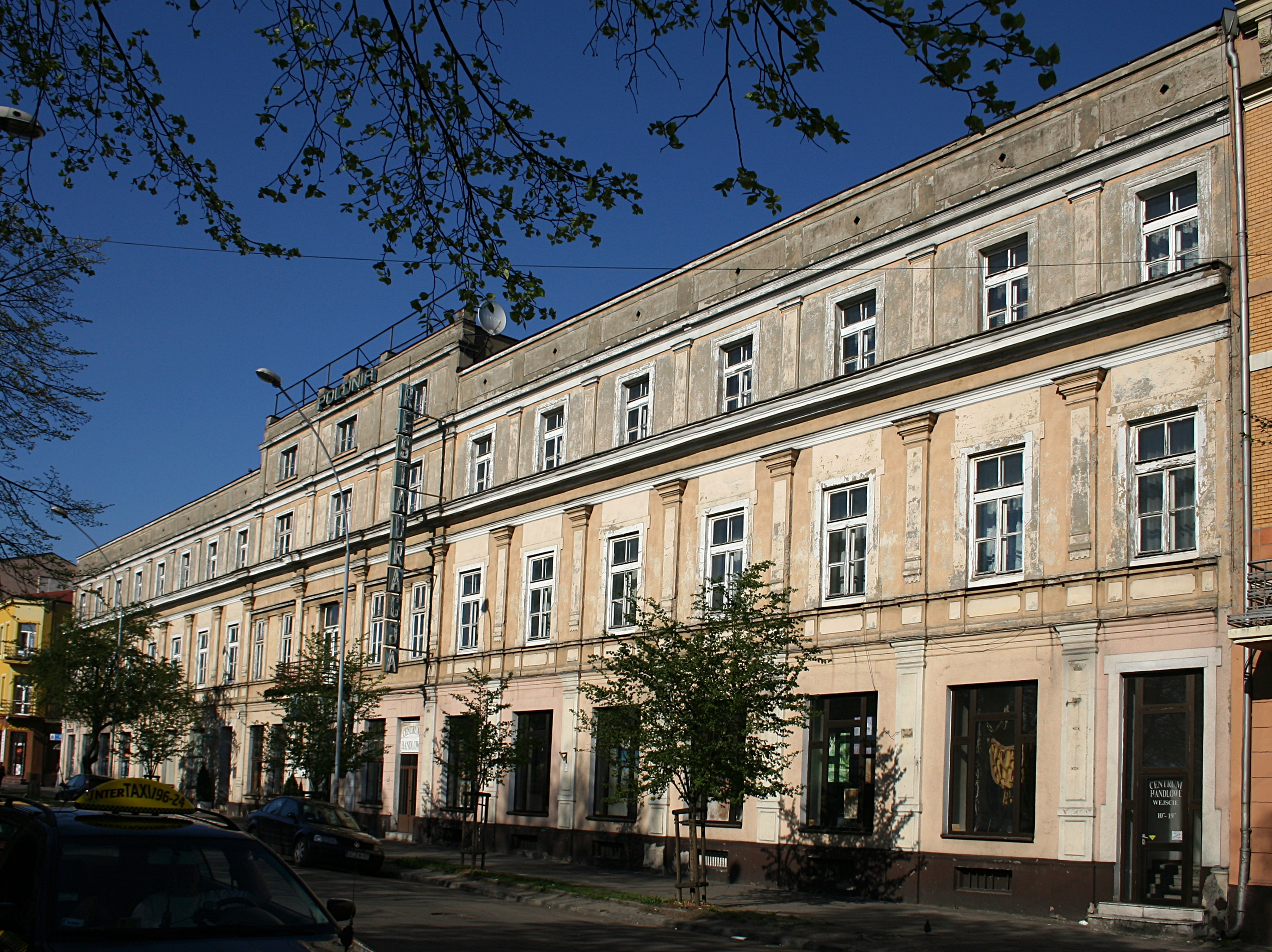 Budynek hotelu Polonia na ulicy Piłsudskiego w Częstochowie.